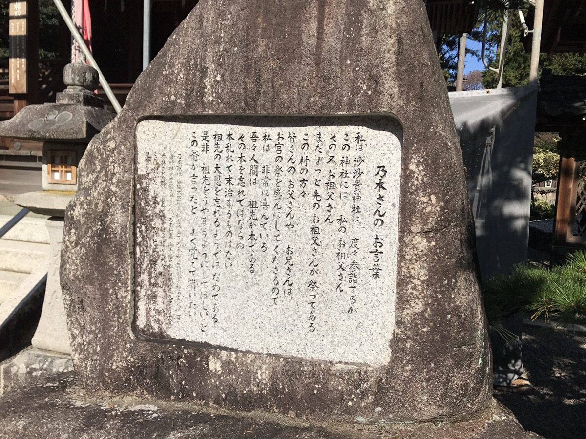 滋賀県近江八幡市の沙沙貴神社境内にある乃木将軍の言葉。